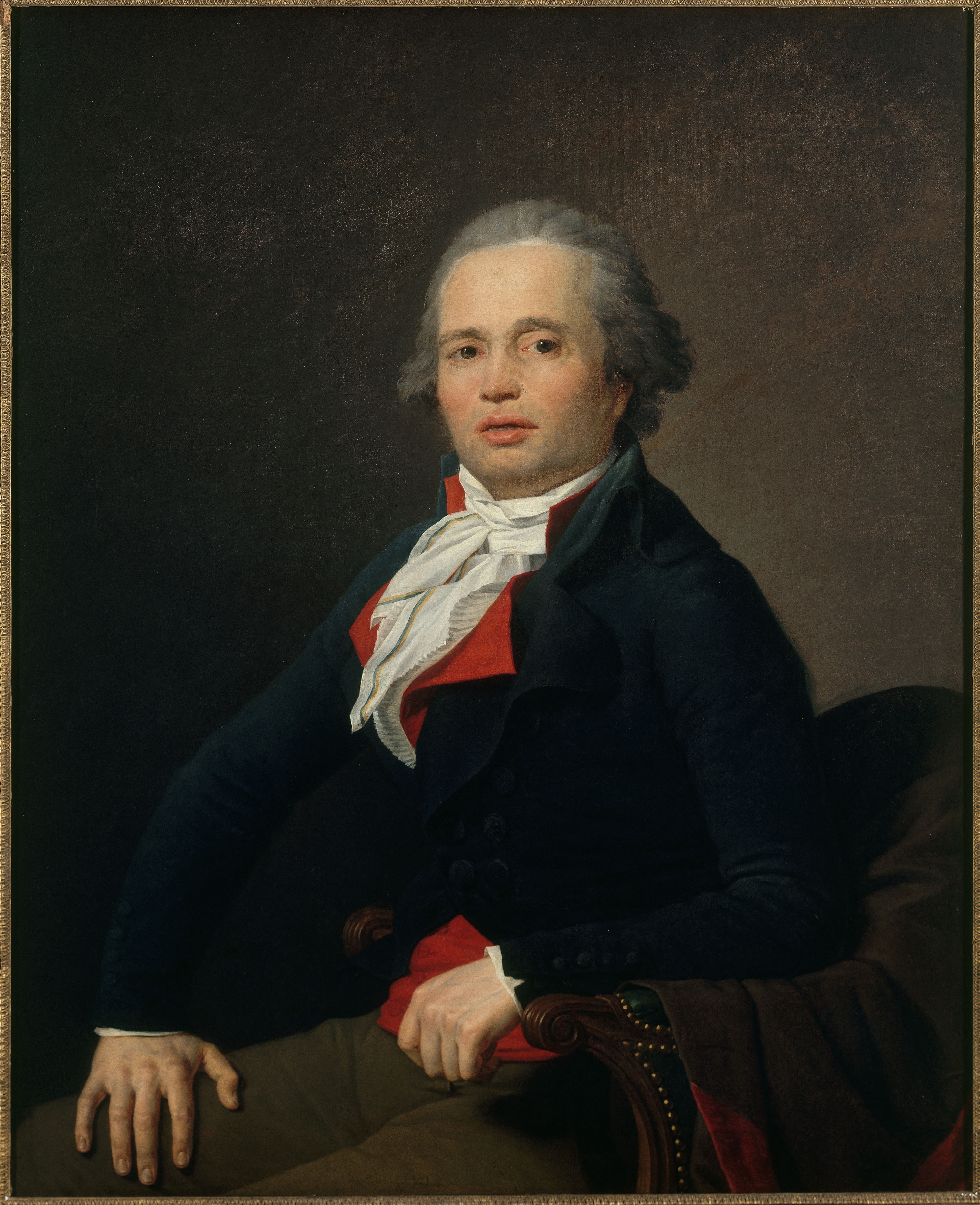 Louis Legendre par Jean-Louis Laneuville, Paris, musée Carnavalet.